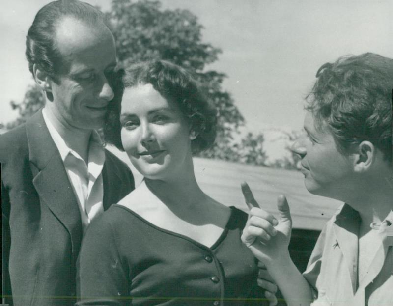 Foto taget i samband med pjäsen "De ljusgula handskarna", Parkteatern i Stockholm. Bildtext i Svenska Dagbladet (1957-06-05 sid 13): "Tom Olsson (längst t.h.) instruerar Leif Liljeroth och Ninja Lannerstedt."